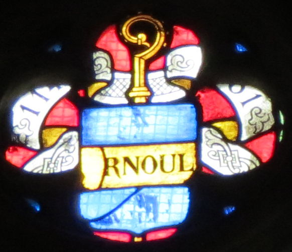 Blason d'Arnoul, évêque de Lisieux (1141-1181).